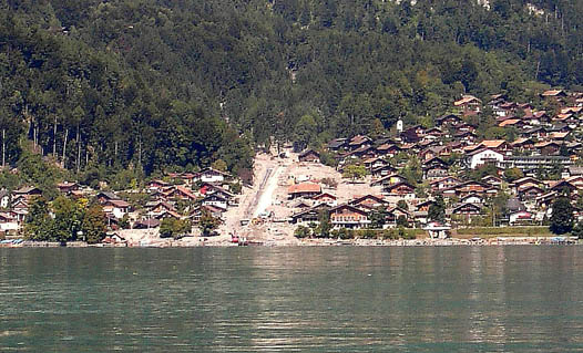 Schuttkegel in Brienz, verursacht durch den Glyssibach, fotografiert am 31. August 2005, 1 Woche nach dem Unwetter.